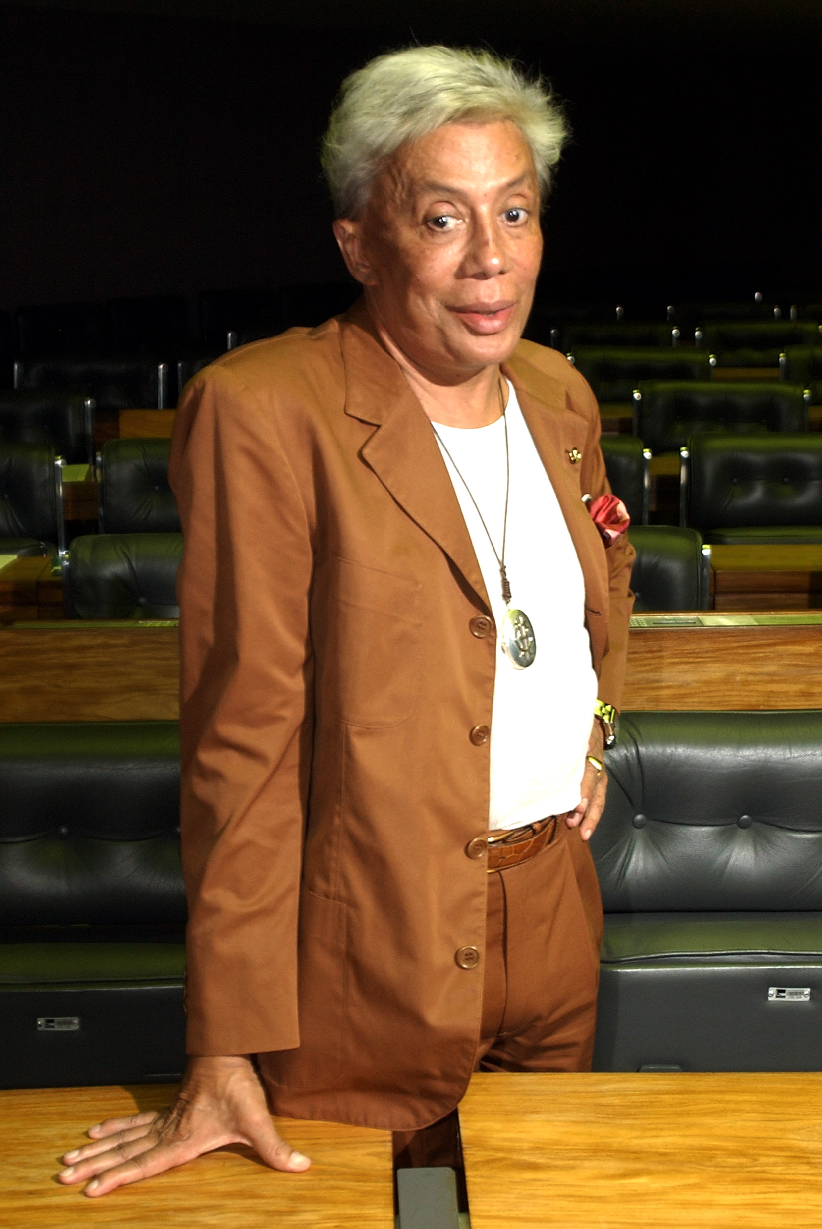 O estilista, apresentador de televisão e político brasileiro Clodovil Hernandes.